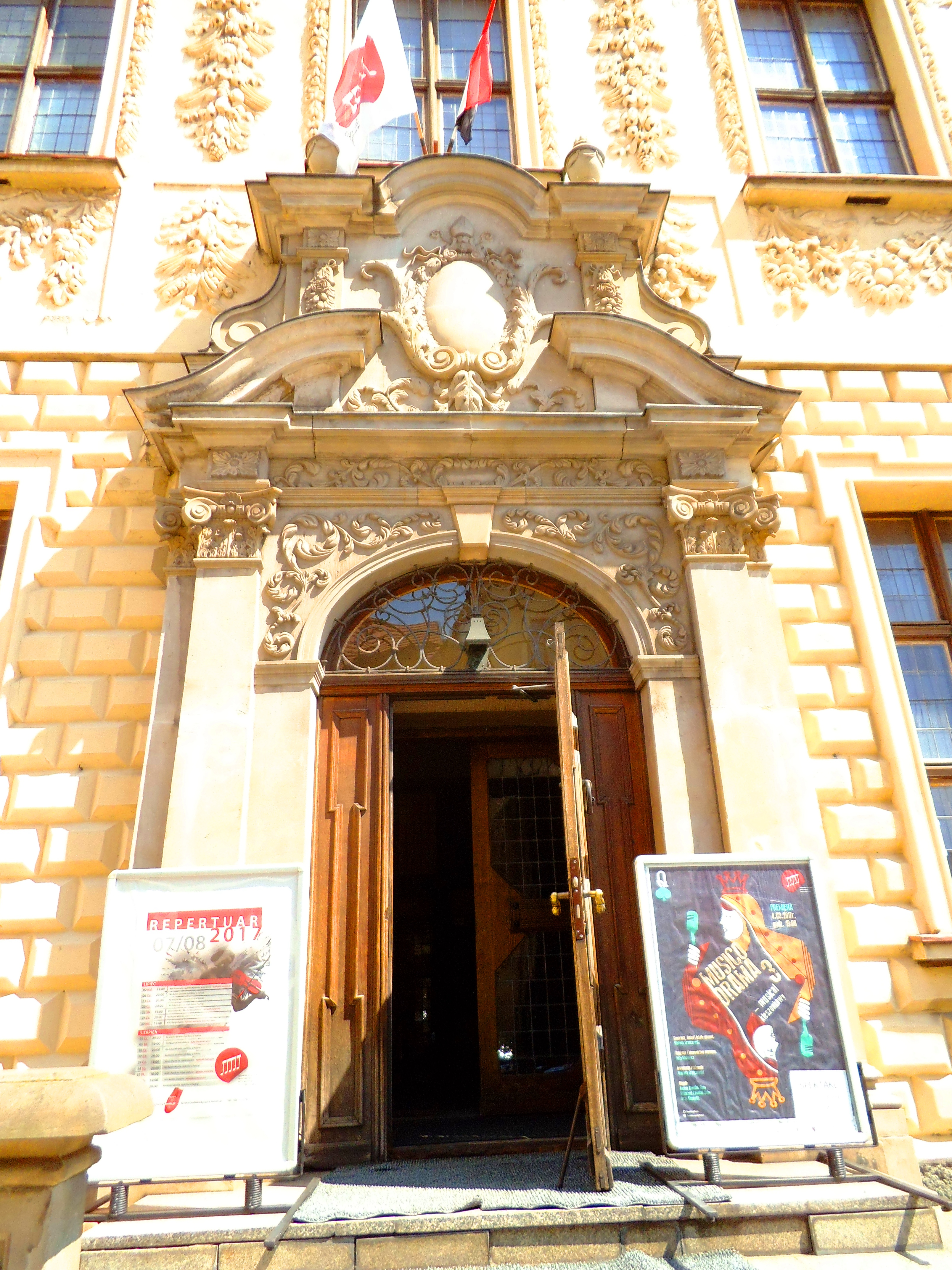 Wejście do Teatru Muzycznego w Toruniu